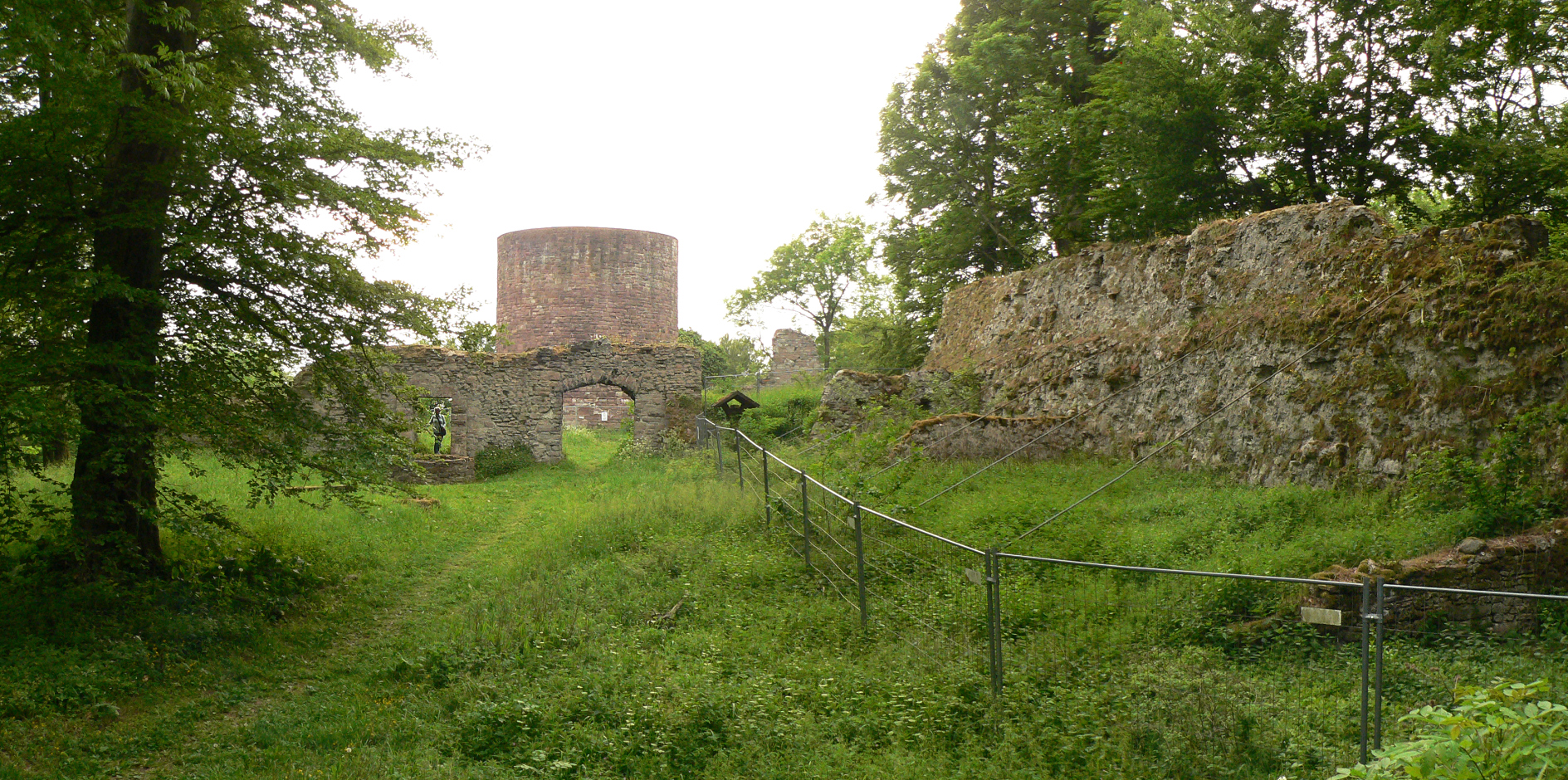 Blick von der Vorburg auf die Hauptburg der Homburg bei Stadtoldendorf